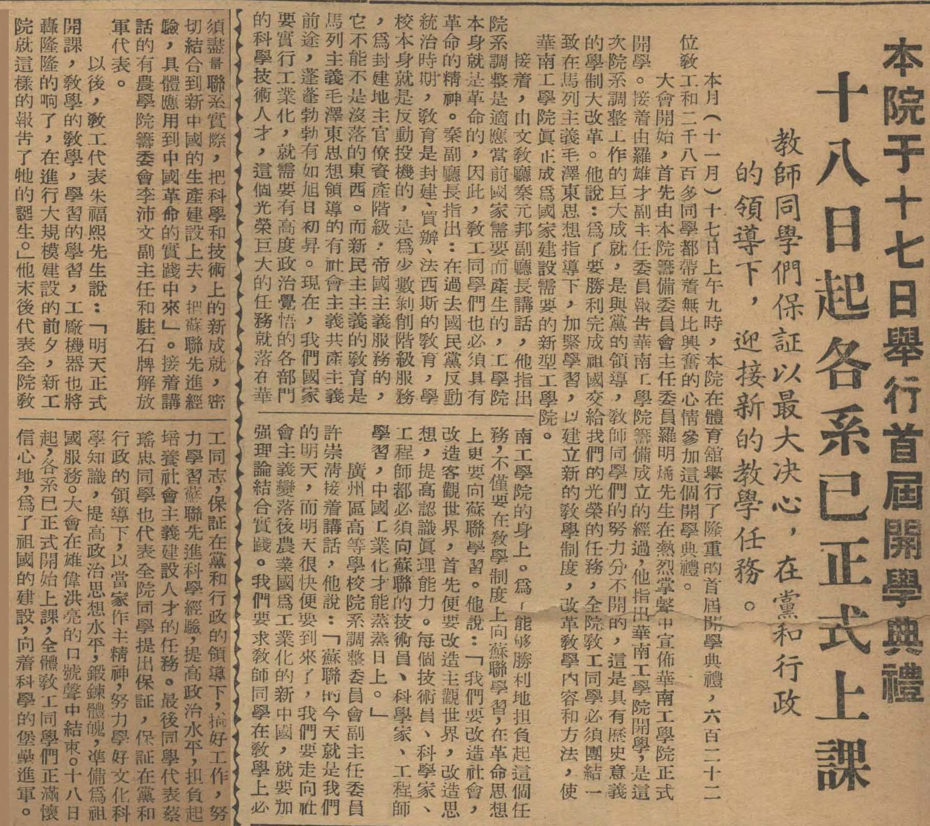 华工校报上有关1952年11月17日华南工学院（现华南理工大学）举行首届开学典礼的报道